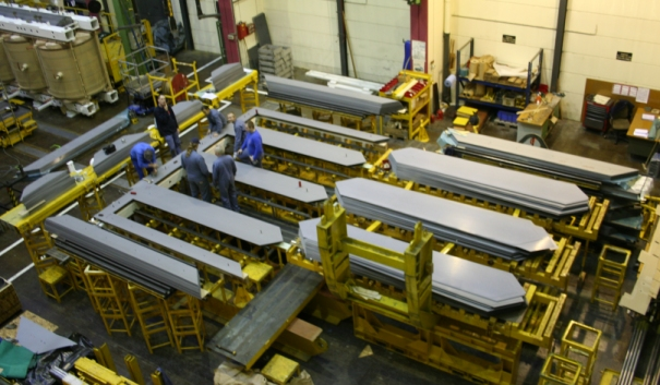 De 5-poot kern van een 375MVA vermogentransformator weegt 100 ton.